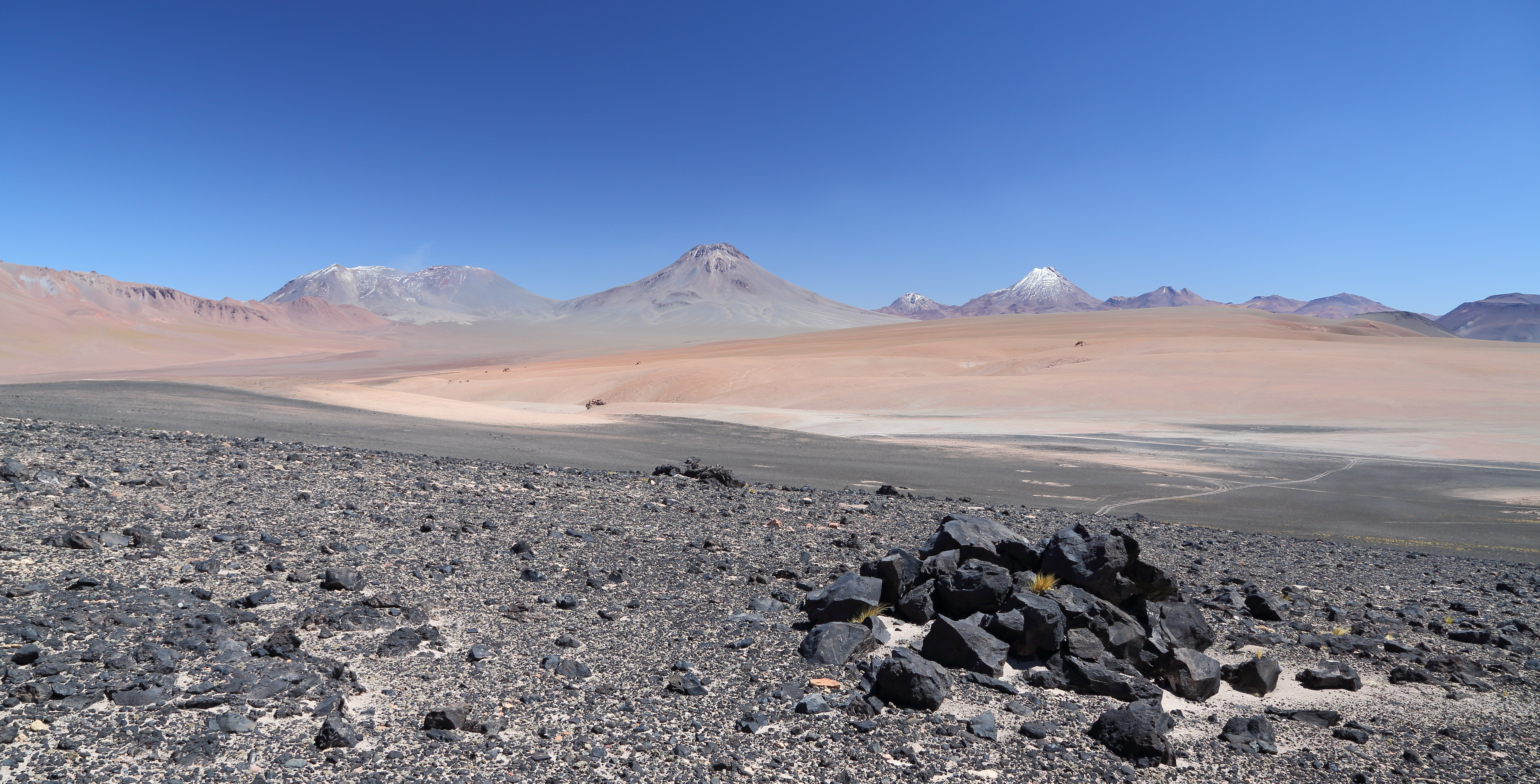 Volcanes: Lascar, Aguas Calientes, y Acamarachi